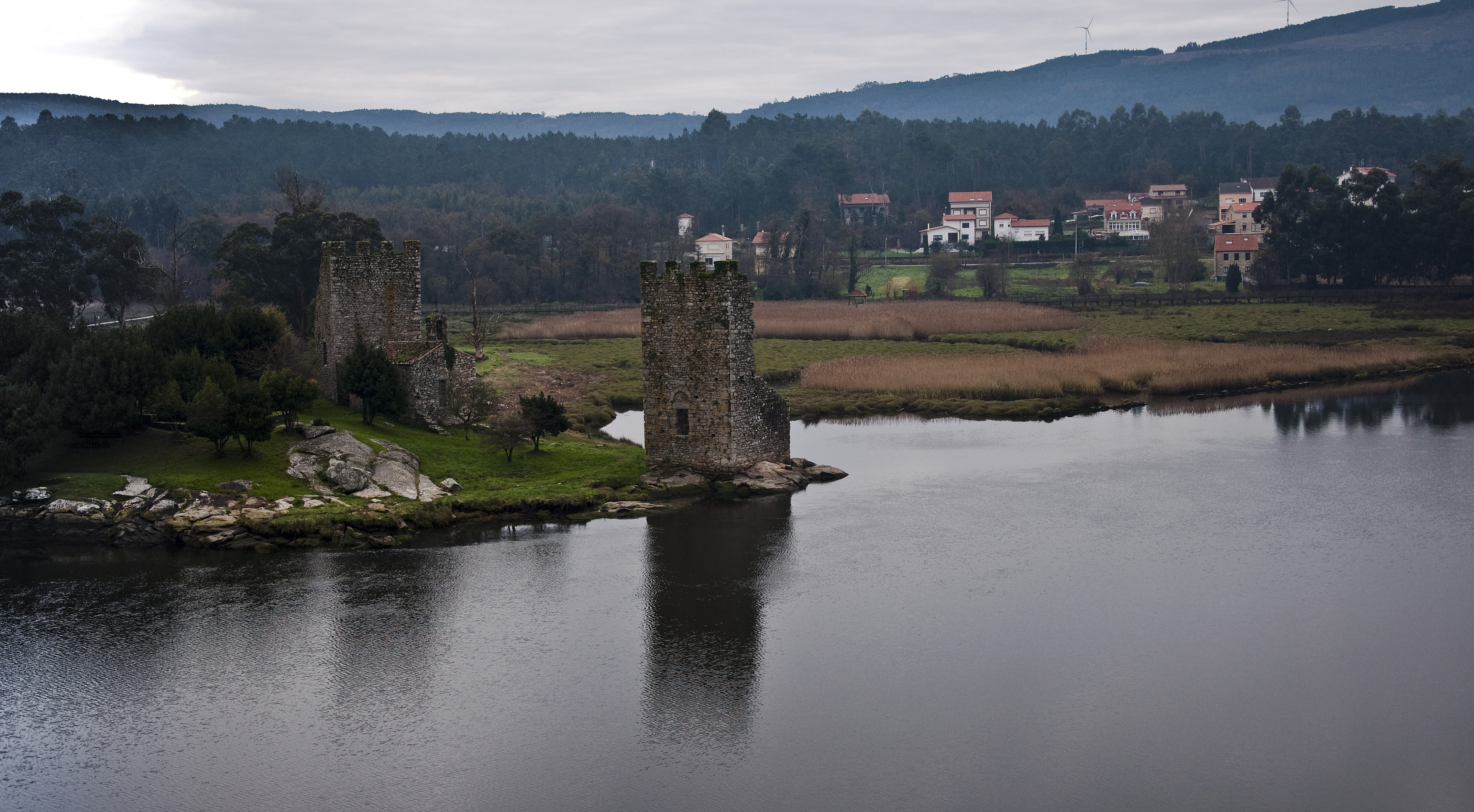 Torres do Oeste dende a ponte (Catoira)